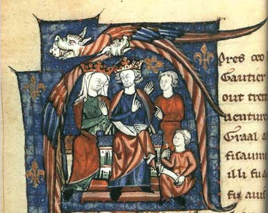 Aliénor d'Aquitaine et Henri II Plantagenêt écoutent Gautier Map conter l'histoire de Lancelot du Lac. Enluminure ornant le manuscrit Lancelot du Lac de Gautier Map, deuxième partie, la Quête du Saint Graal, la Mort d'Arthus, vers 1301-1400, BnF, Manuscrit Français 123, folio 229.